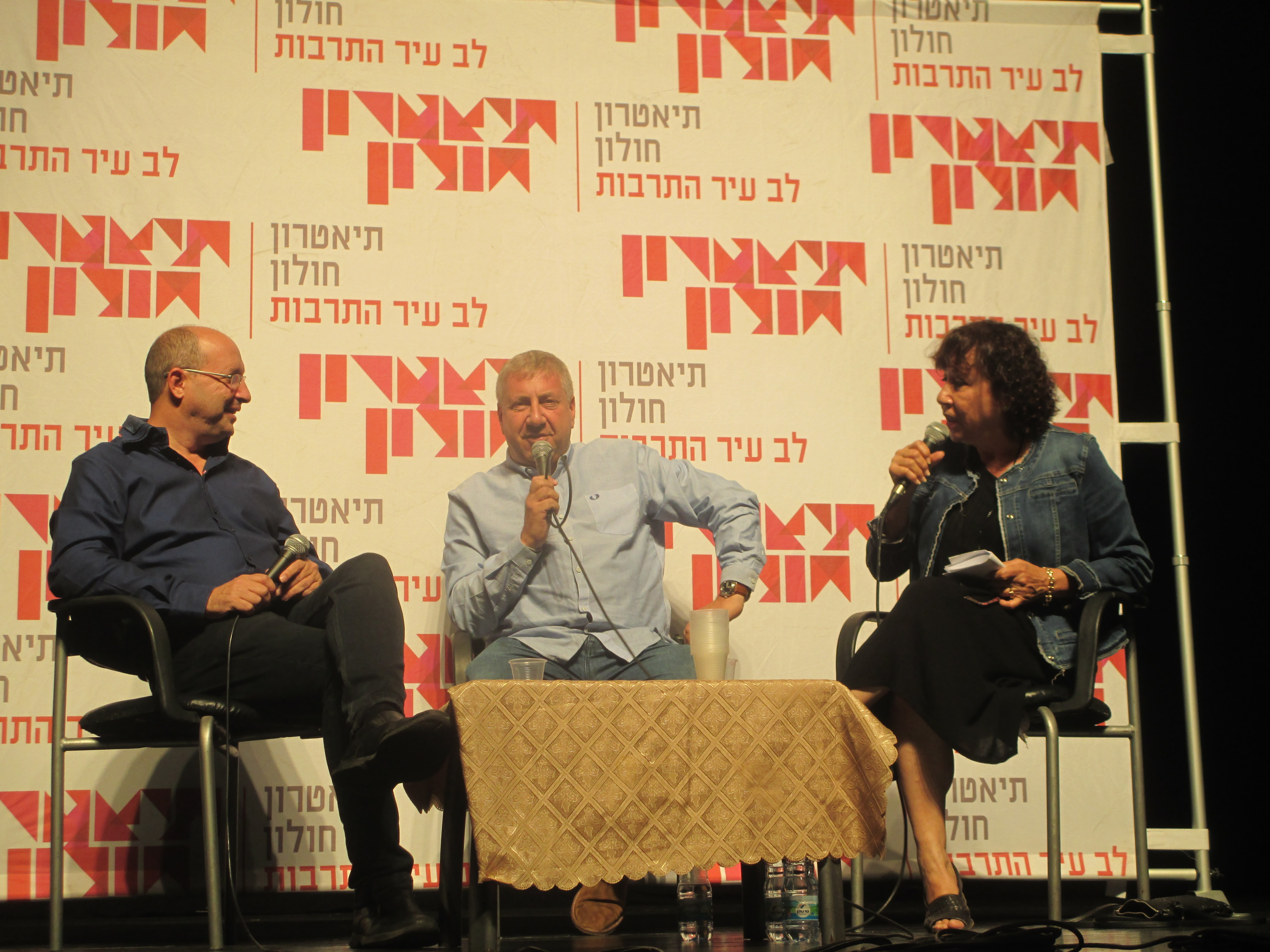 יעקב ברדוגו ואבי ניסנקורן בשבתרבות עם נחמה דואק ברמת גן